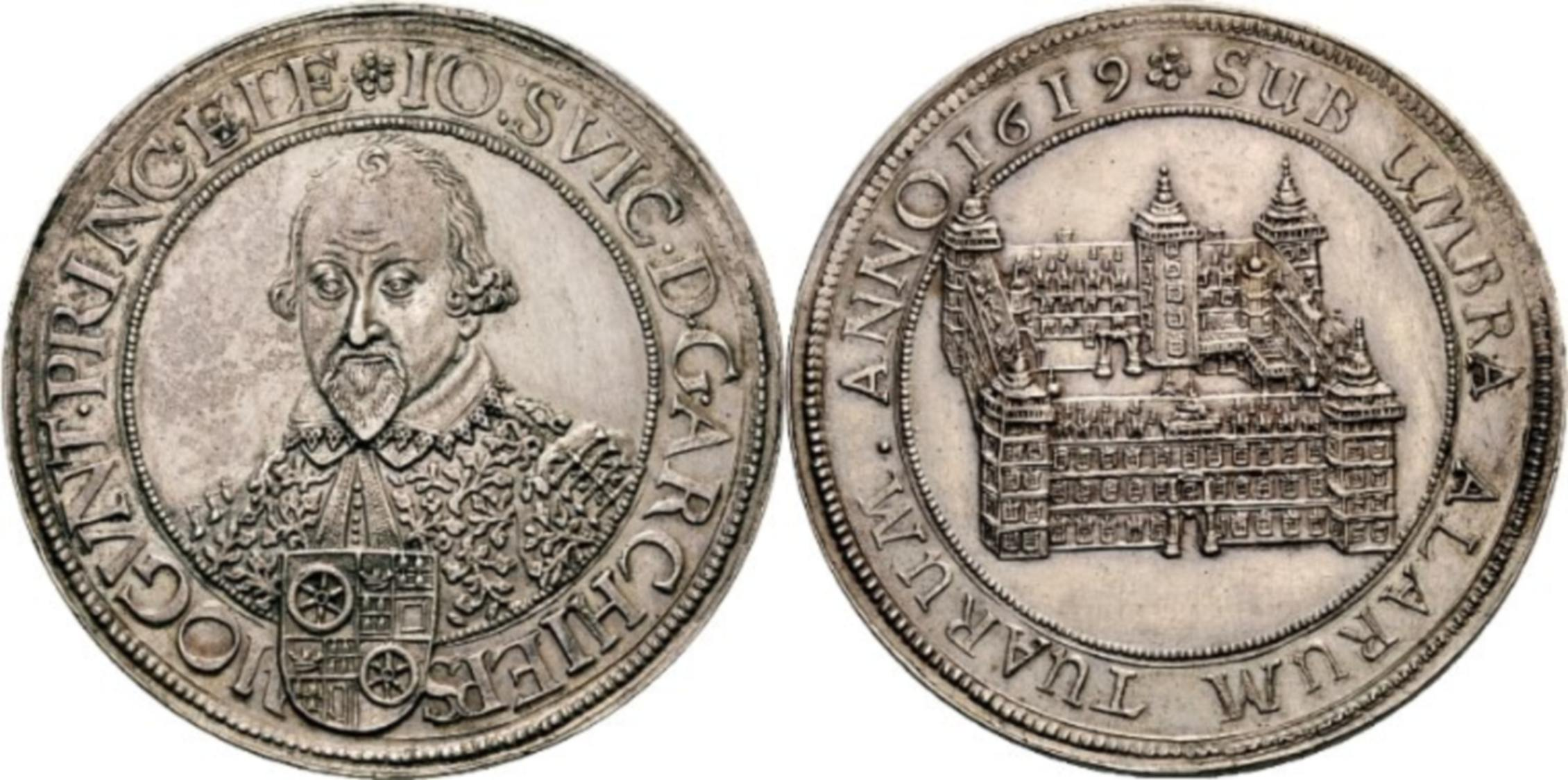 Johann Schweikard von Kronberg, 1604-1626 Reichstaler 1619, Frankfurt am Main? 28.27 g. Stempel von Lorenz Schilling? Barhäuptige Büste des Erzbischofs halblinks, unten der quadrierte Wappenschild Mainz/Kronberg / Ansicht des Schlosses aus der Vogelschau, ohne Künstlersignatur.